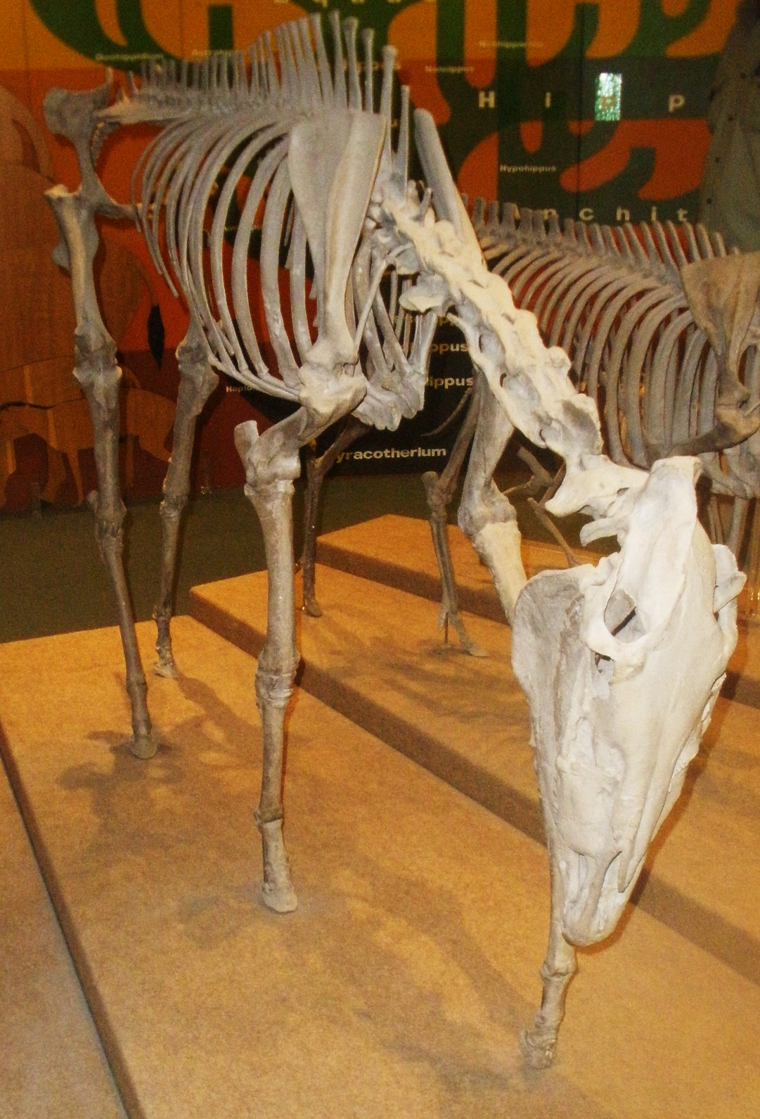 Fossil of Dinohippus, an extinct mammal - Took the picture at Museo di Paleontologia di Firenze